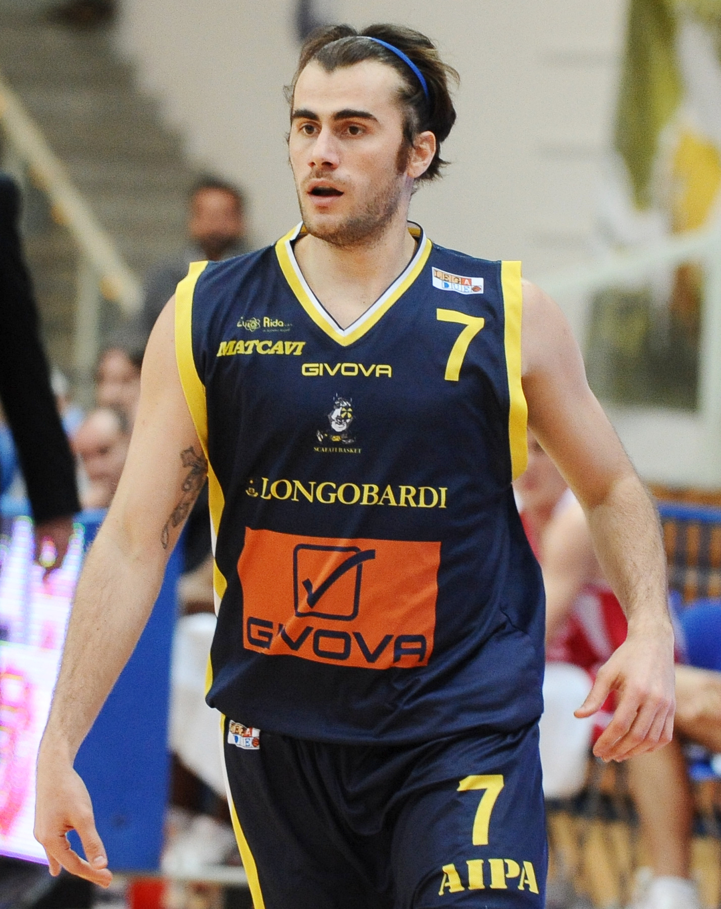 Franko Bushati con la maglia dello Scafati Basket al PalaTrento.